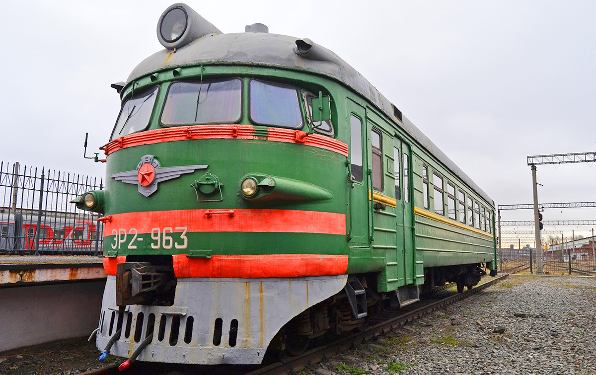 Построен в 10-вагонной составности Эксплуатация: 1972 — 2000 в ТЧ-8 ОКТ Ленинград-Пассажирский-Московский 2000 — 04.2007 в ТЧ-10 ОКТ Санкт-Петербург-Московское (Металлострой) с 04.2007 года в ТЧ-20 ОКТ Санкт-Петербург-Финляндский Отставлен от эксплуатации под списание осенью 2007 года Особенности: В 2007 году, после переоборудования, работал с тепловозами М62 на неэлектрифицированном участке 10.02.2009 вагон 96309 передан в музей ОКТ ЖД на Варшавском вокзале (по данным Вагон 96308 списан в середине 90-х гг. КР Октябрьский ЭВРЗ 1997 г.